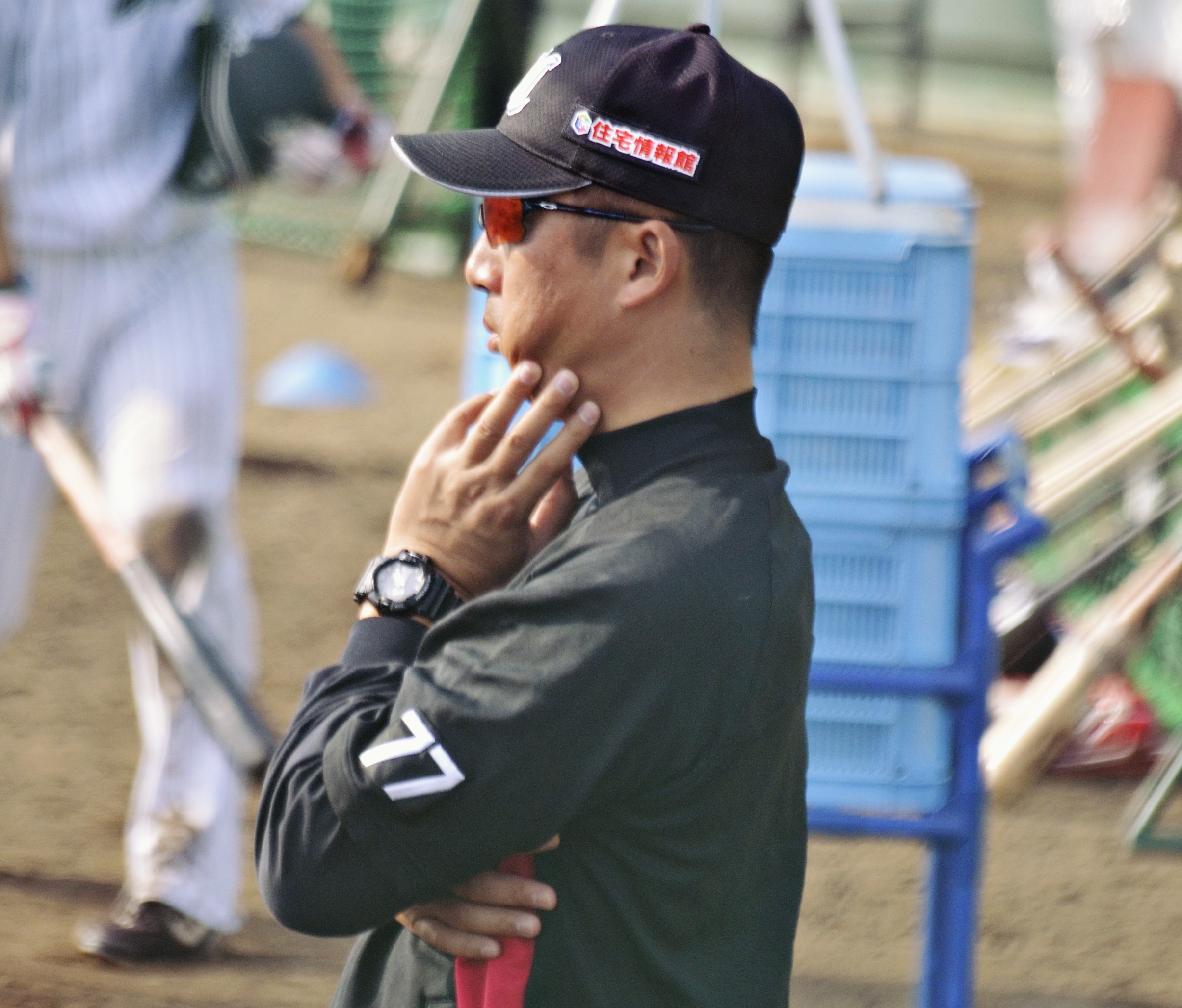 ロッテの今岡二軍監督